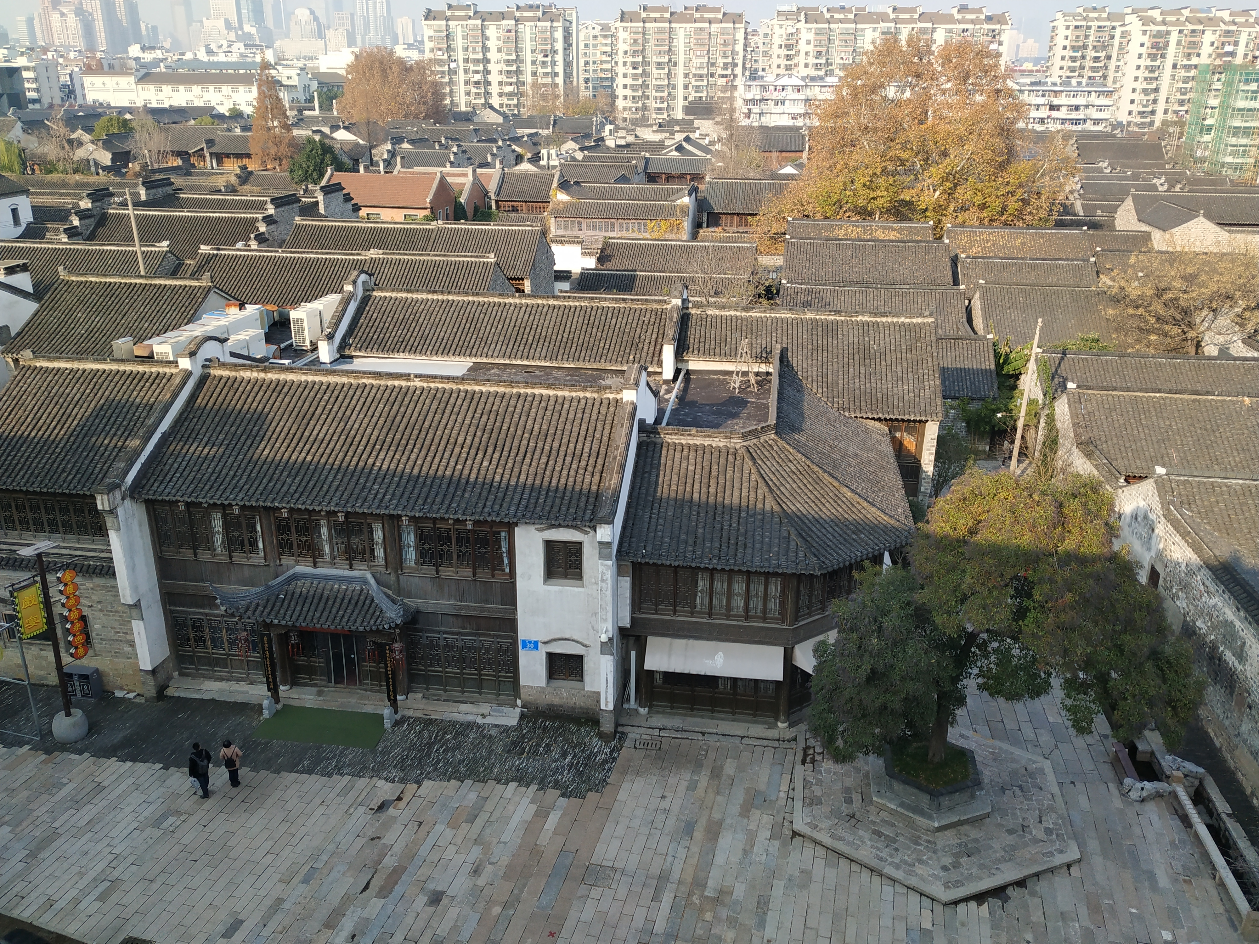 中文（中国大陆）: 南京城墙俯瞰老门东